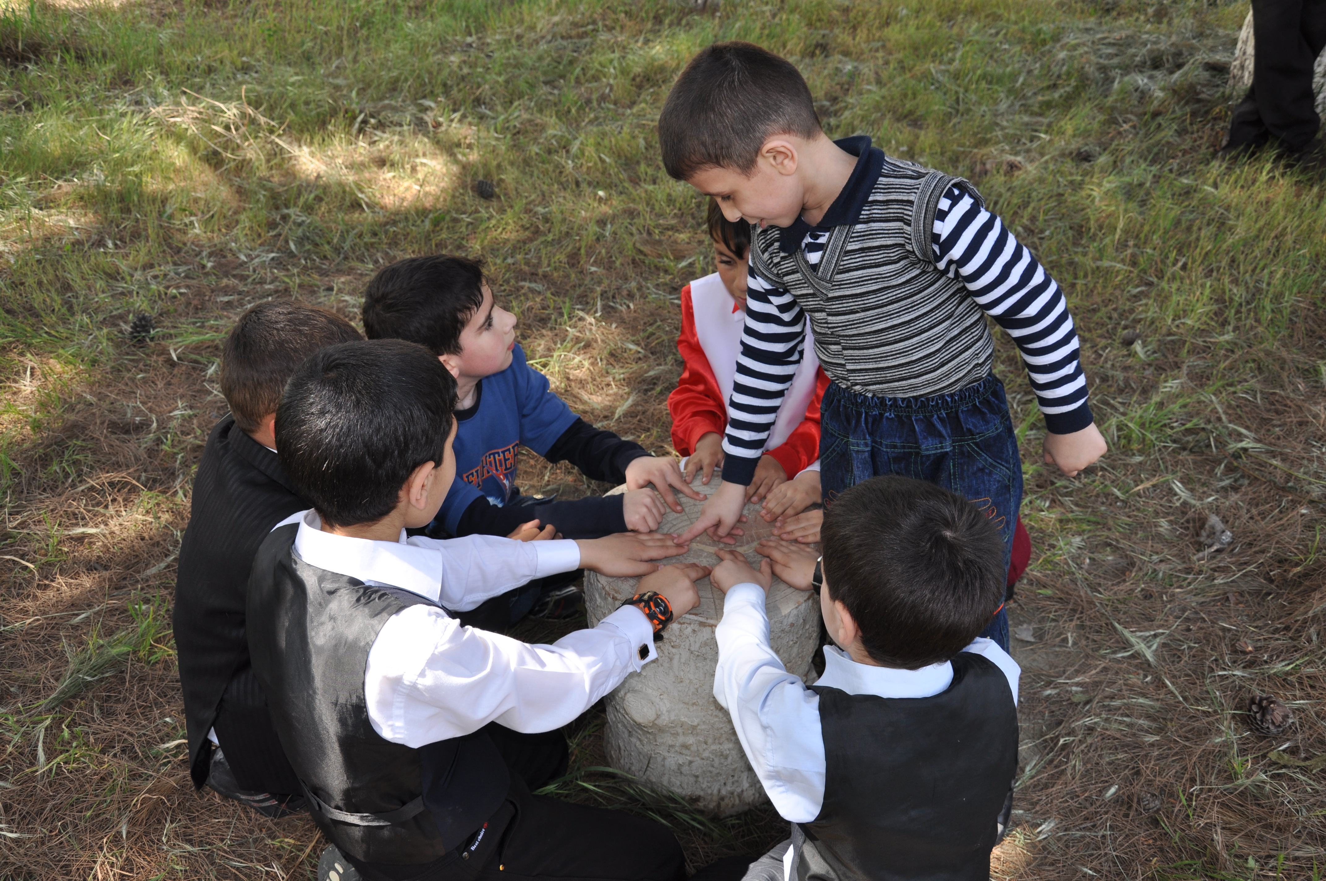 Barmaq oyunu — Azərbaycanda ən çox yazqabağı (bayramqabağı) günlərdə əsasən uşaq və gənclər arasında, geniş şəkildə oynanılan qədim oyunlarından biridir.